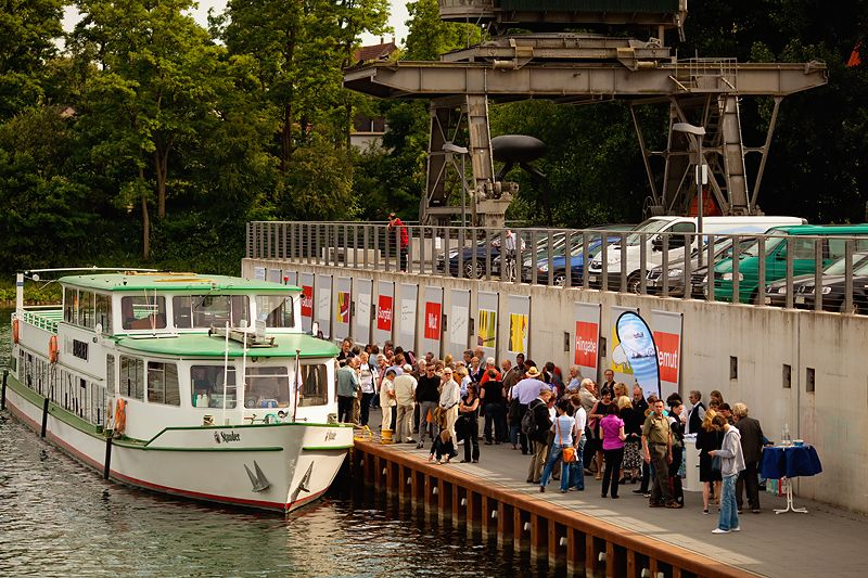 Ufer des KulturKanals / Stadthafen Recklinghausen